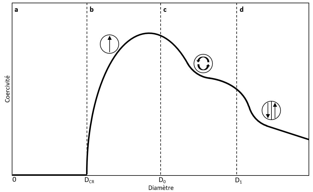 Allure de la coercivité dans des nano particules métalliques ferromagnétiques en fonction du diamètre. a) Régime superparamagnétique, b) Régime ferromagnétique monodomaine, c) Etat de vortex, d) Régime ferromagnétique multidomaines